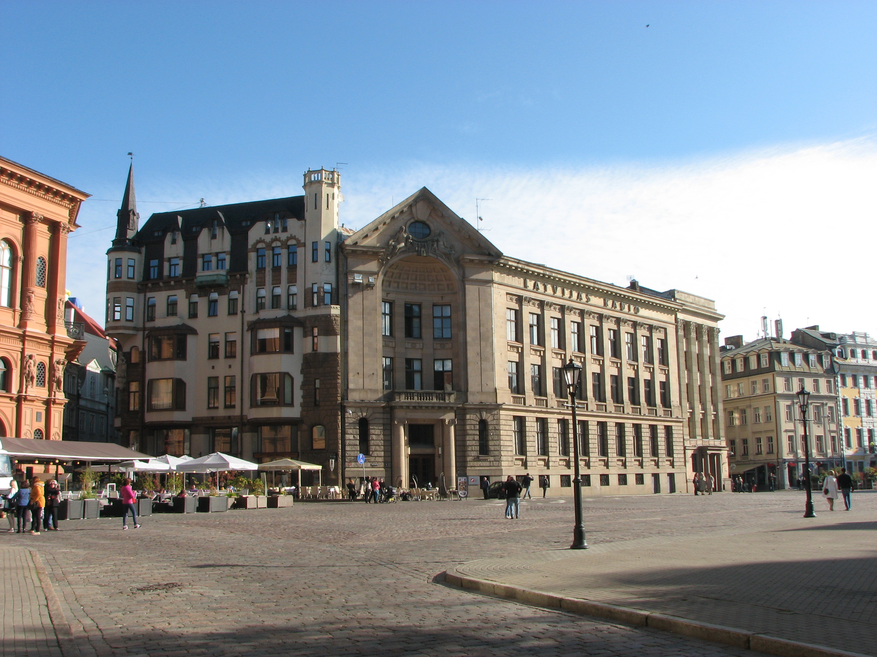 Riga. Latvijas radio.